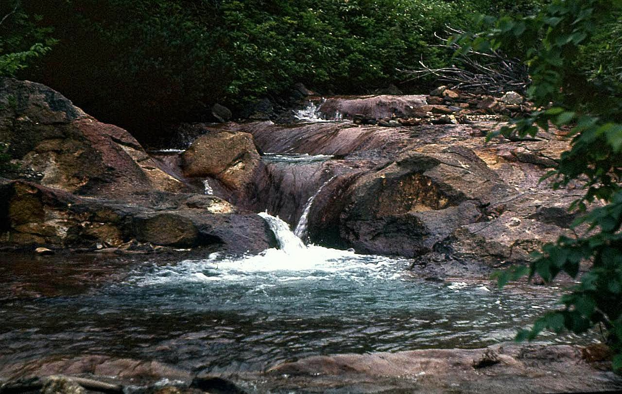 Deitsch: Sernaya Fluss